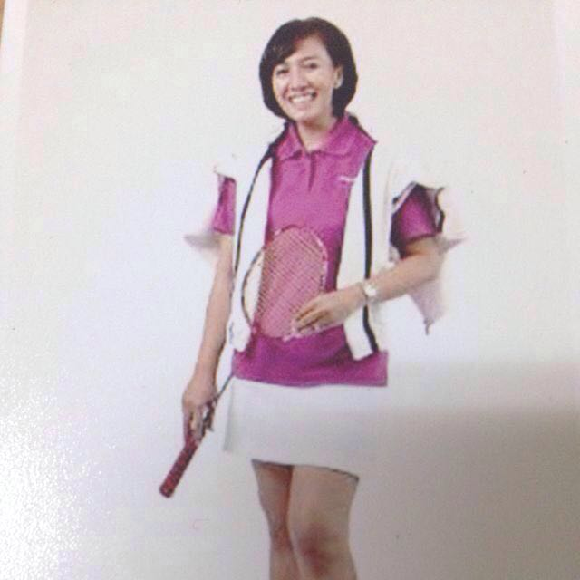 Erma Sulistianingsih adalah seorang pemain bulu tangkis Indonesia di era tahun 1990-an